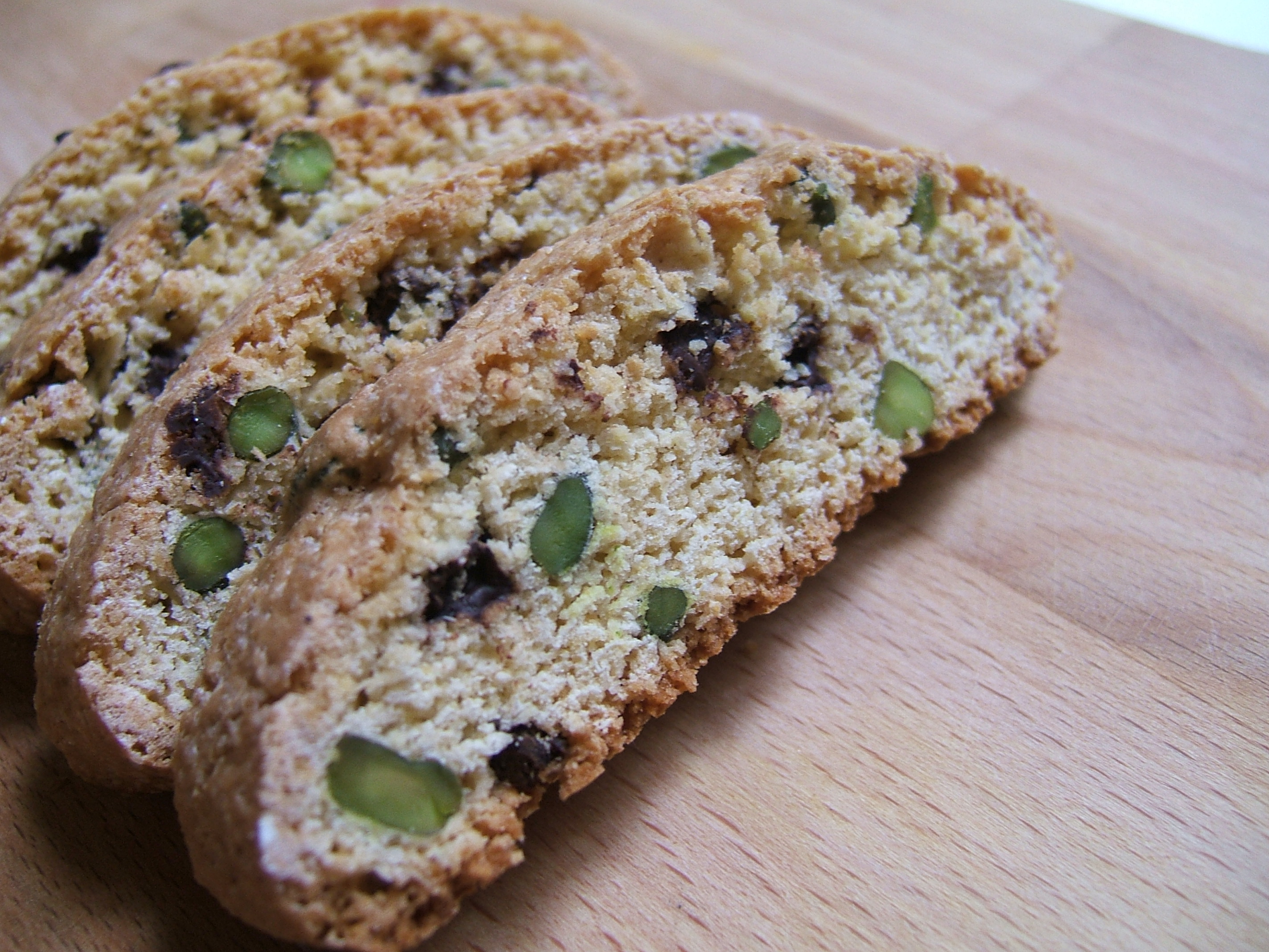 ביסקוטי עם שוקולד ופיסטוק.